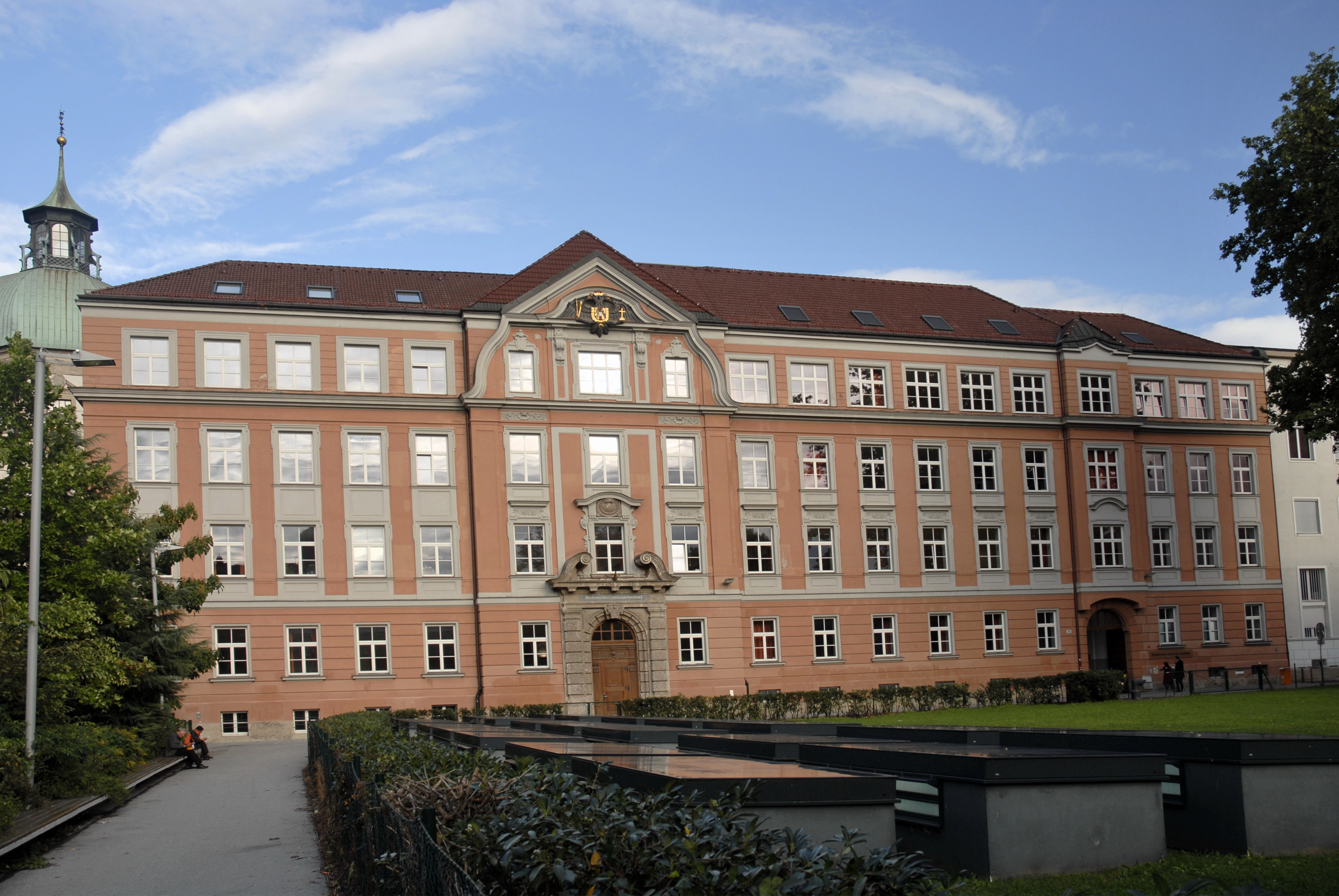 Innsbruck, Akademische Gymnasium von Westen